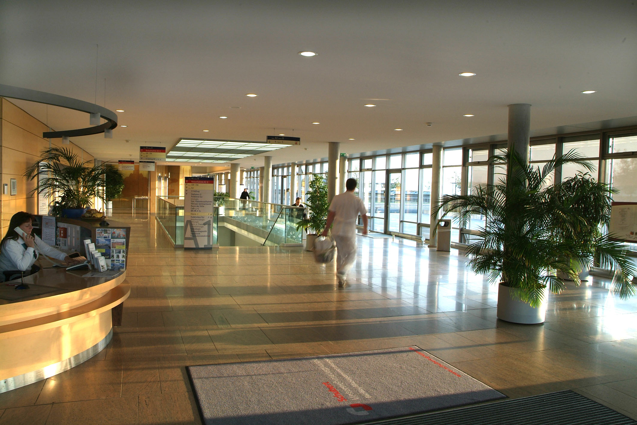 Innenansicht des Zentrums für Operative Medizin des Universitätsklinikums Würzburg